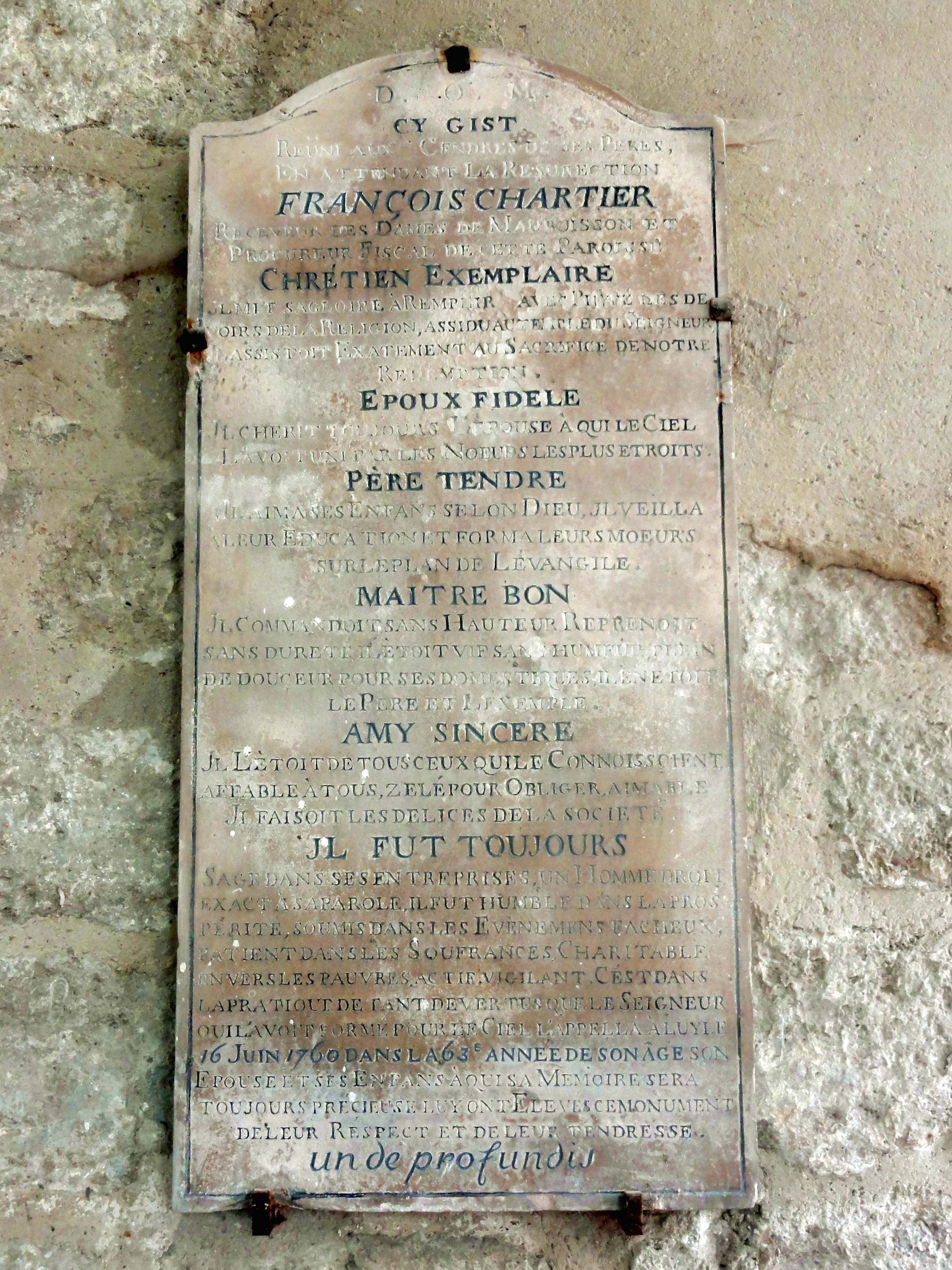 Bas-côté sud, plaque funéraire de François Chartier, procureur fiscal de la paroisse, mort le 16 juin 1760.